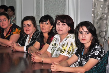 Преподаватели Худжандского госуниверситета. Женщины г. Худжанда (Таджикистан)Тоҷикӣ: Устодони Донишгоҳи давлатии Хуҷанд. Занҳои ш. Хуҷанд